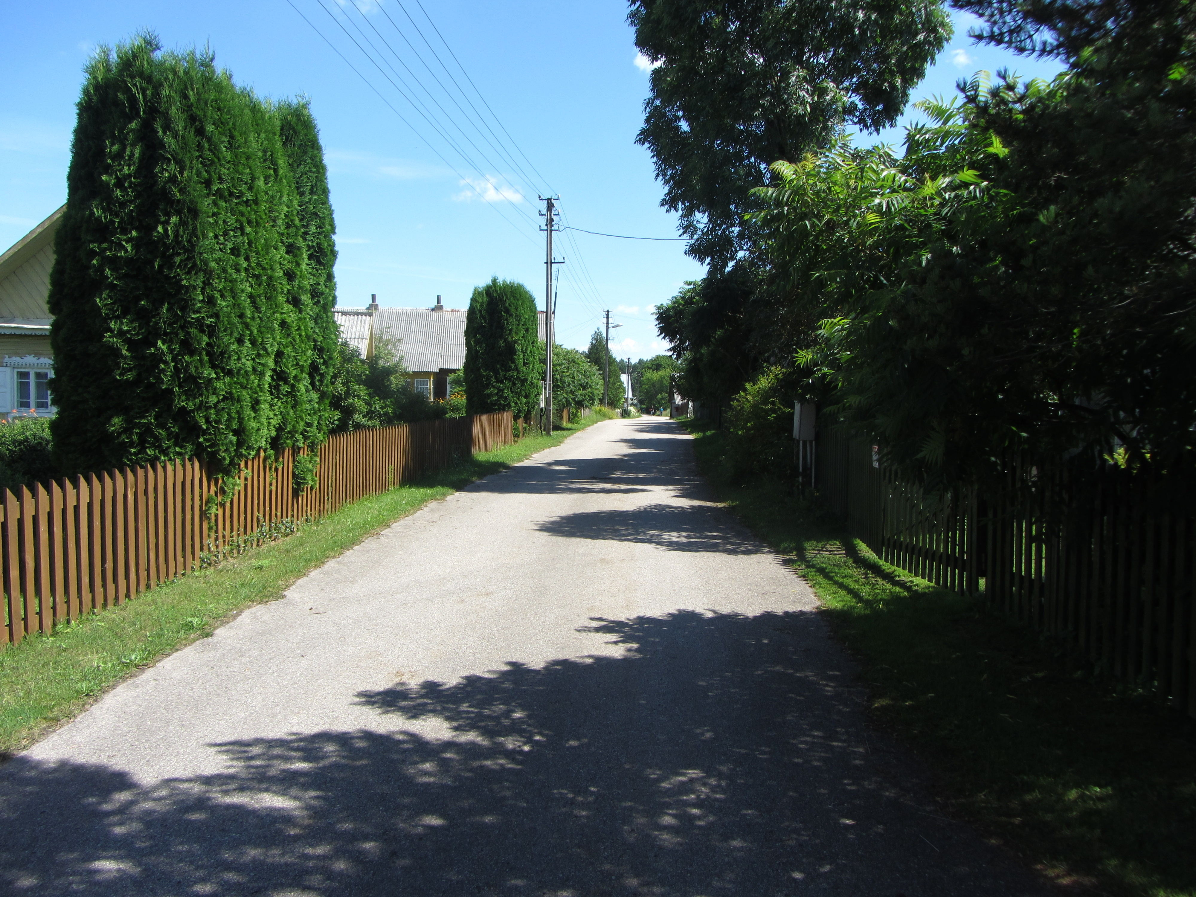 Daržininkai 65442, Lithuania